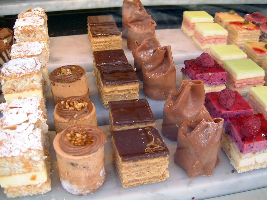 Petits fours in der Konditorenauslage in Brügge